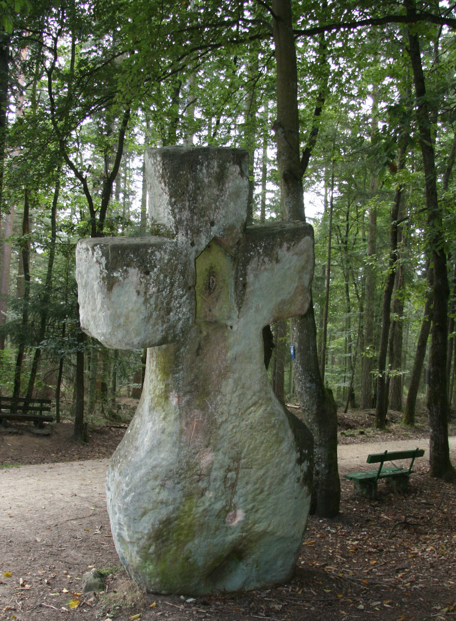 Fraubillenkreuz - christianisierter Menhir auf dem Ferschweiler Plateau in der Eifel